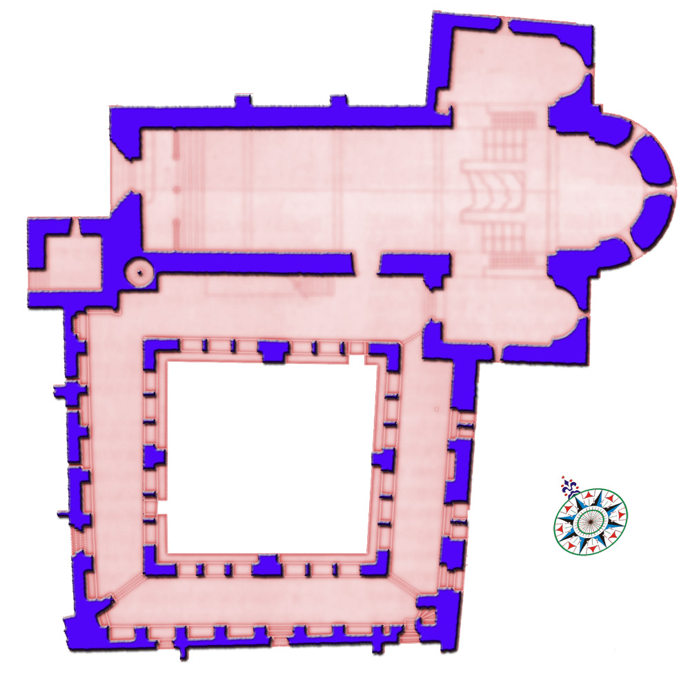 Iglesia perteneciente al monasterio de San Benet de Bages es un monasterio benedictino situado en el término municipal de Sant Fruitós del Bages en la comarca catalana del Bages. El monasterio se construyó en el siglo X y fue historiografiado y restaurado a principios del siglo XX por el arquitecto Josep Puig i Cadafalch.